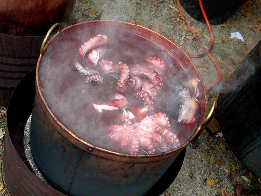 Polbo á feira. Vista xeral do dolmen de Dombate.